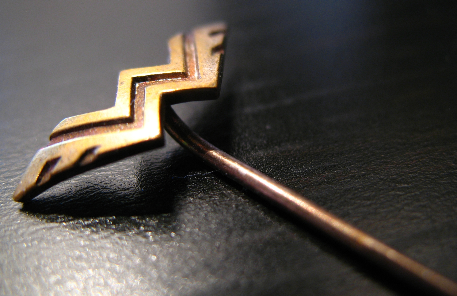 Anstecknadel der Firma Wanderer, 1930er Jahre, Auszeichnung für Mitarbeiter